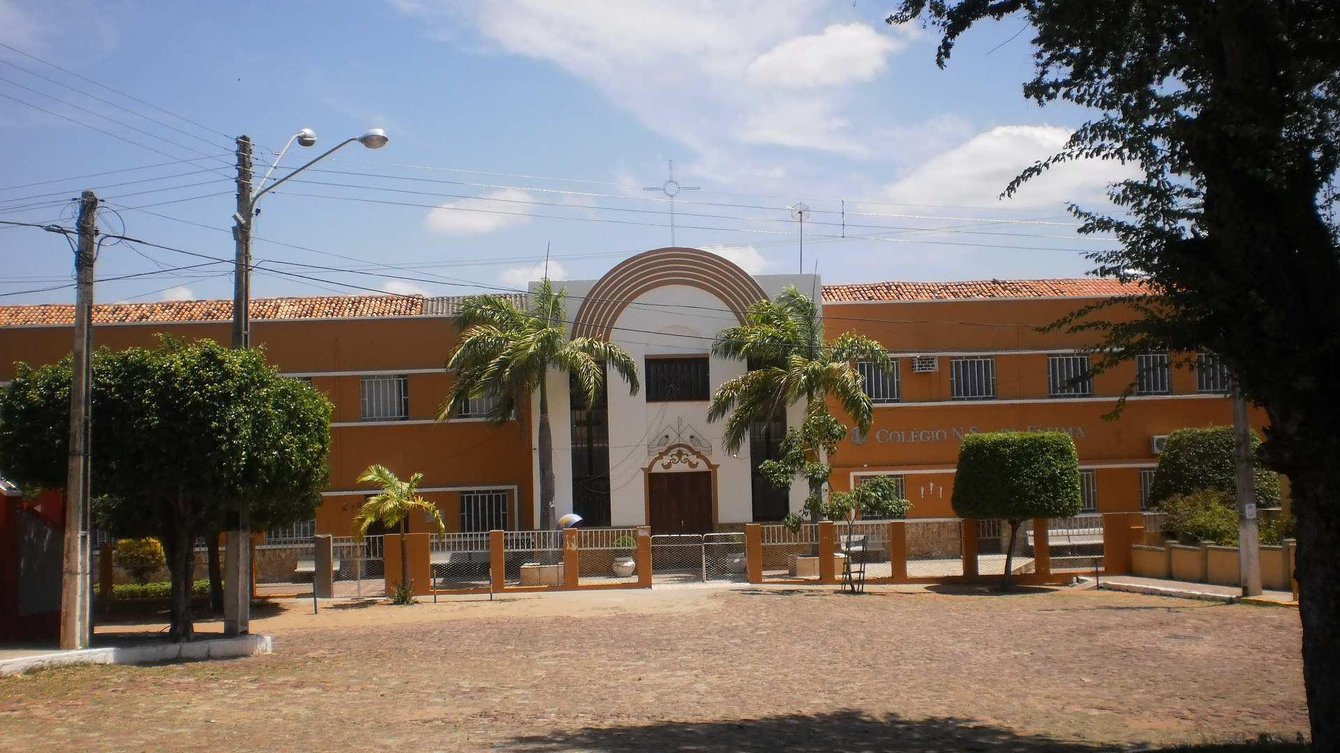 Fachada do Colégio Nossa Senhora de Fátima - Barbalha